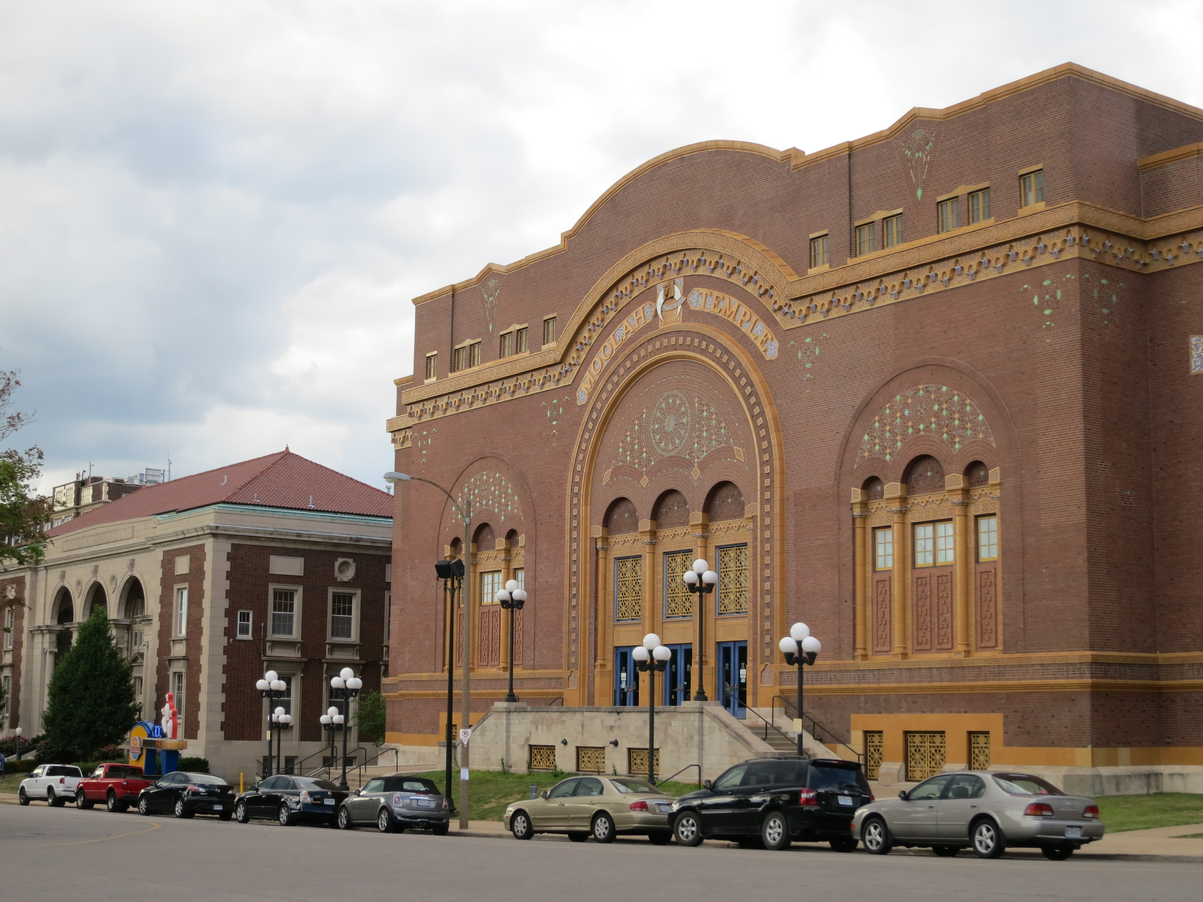 Moolah Temple